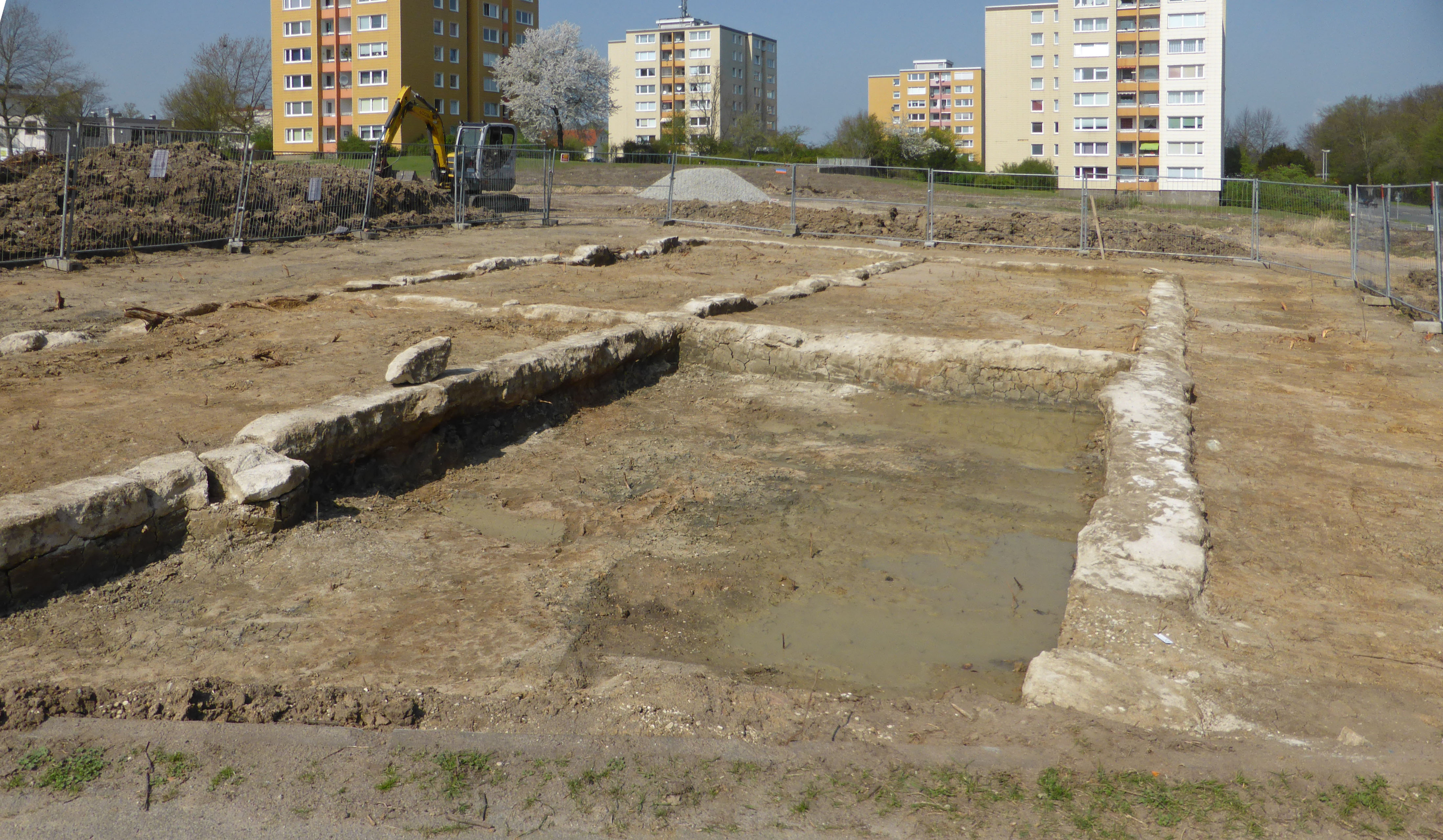 Barackenfundamente an der Breslauer Straße aus den 1940er jahren, freigelegt 2017.